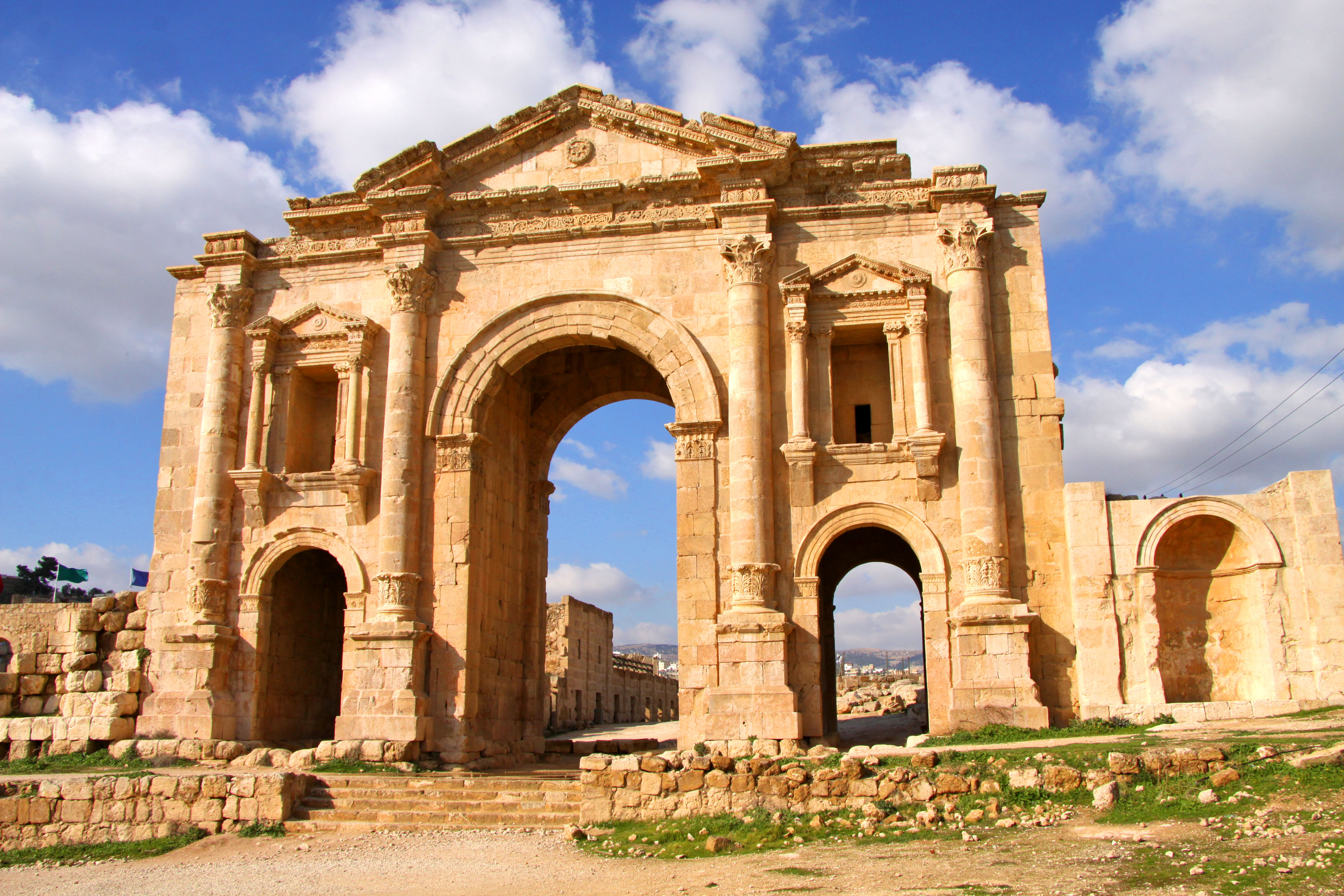 Jerash, Jordanie. L'Arc d'Hadrien.